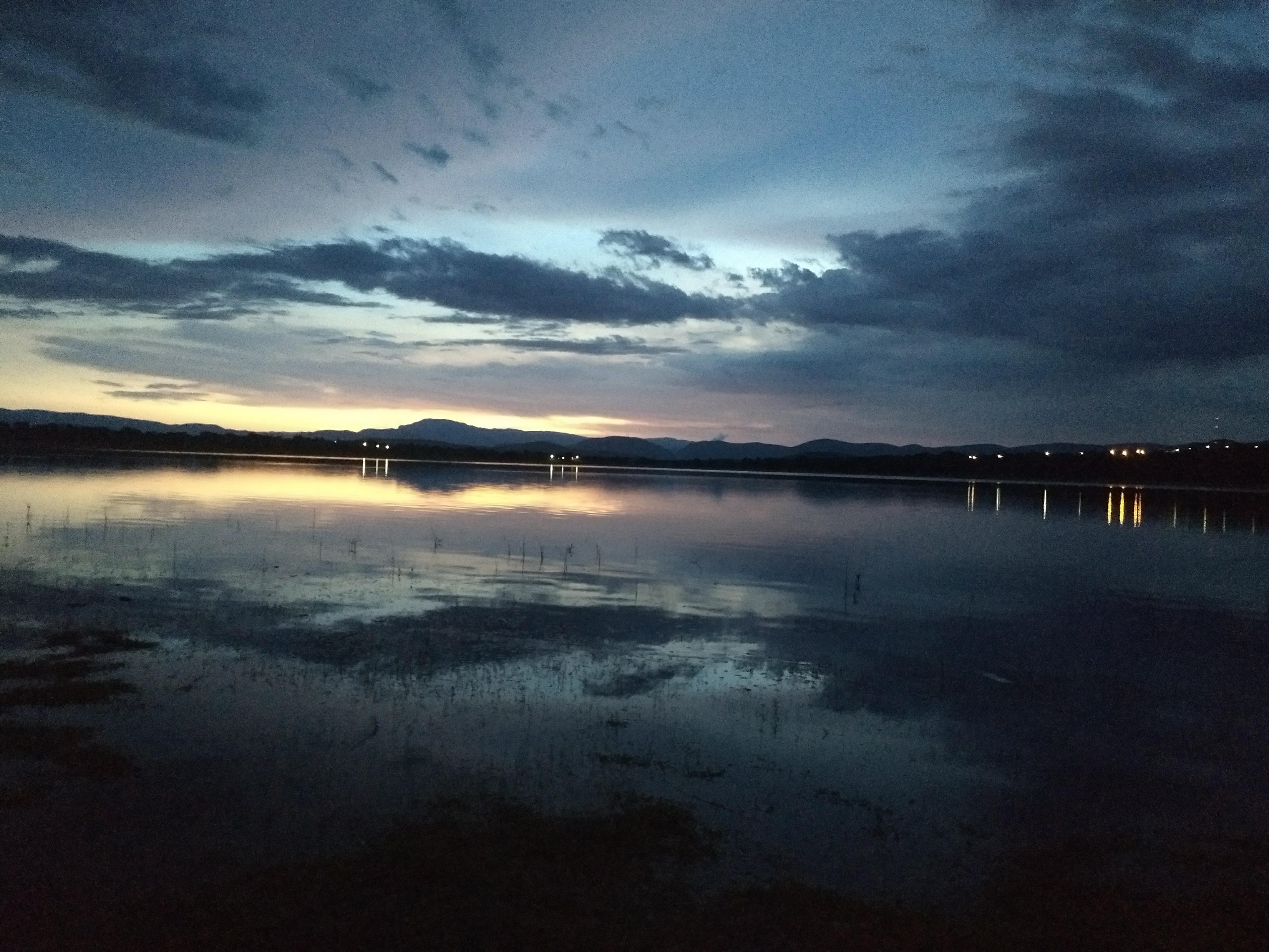 Fotografia del noche de la Laguna del Rodeo, Morelos 2018